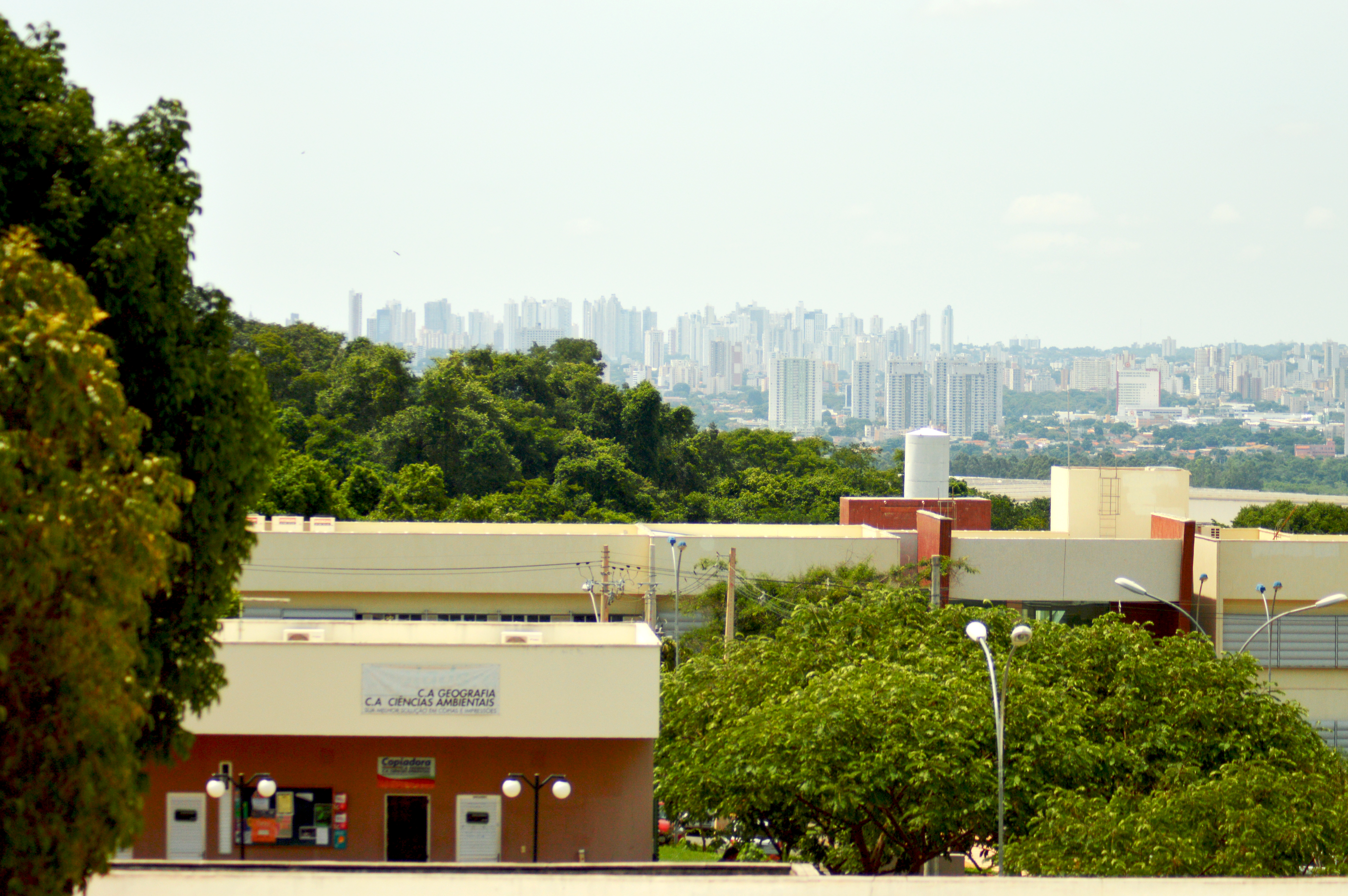 Vista de Goiânia a partir do IESA da UFG Samambaia, em novembro de 2015.